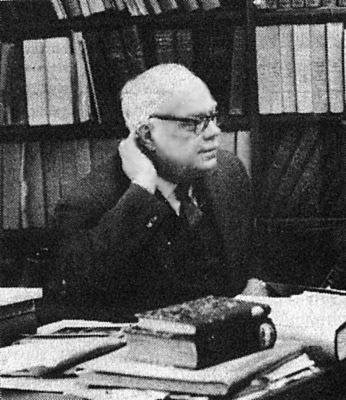 Андрей Грабар - фотоография